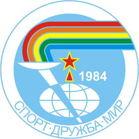 Логотип международных соревнований «Дружба-84»